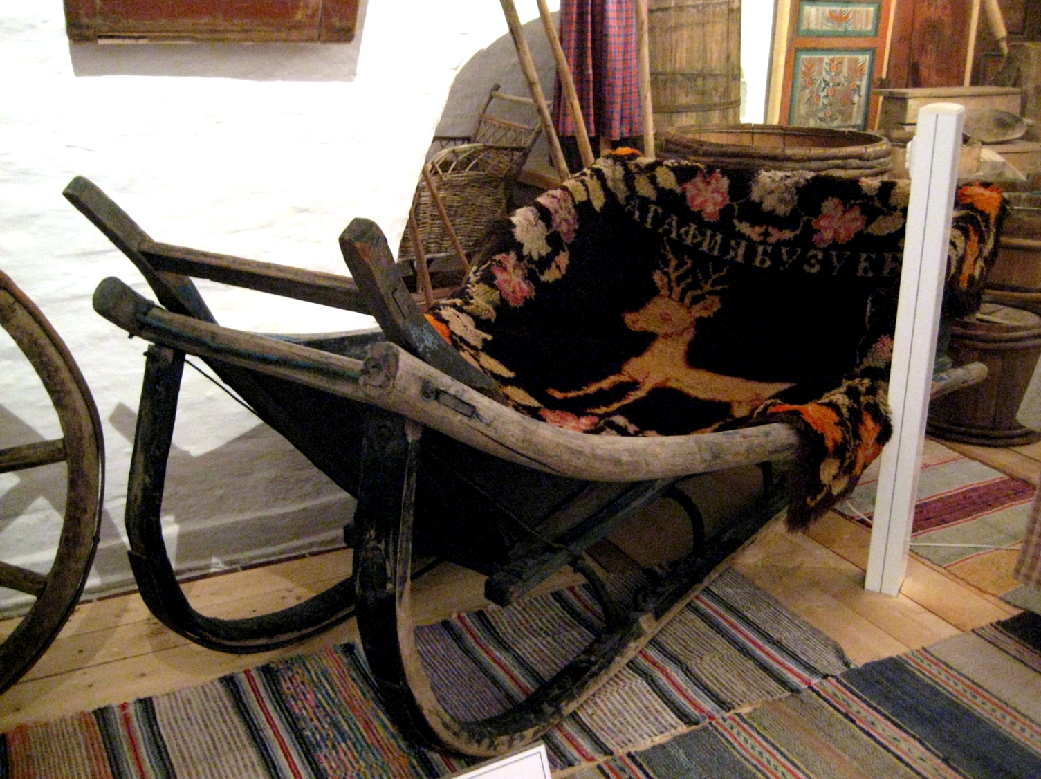 Сани. Начало 20 века. Дар Сергея Андреевича Петрухичева из деревни Бархатово Печенегского сельского совета. Полость для саней. Конец 19 века. Дар Татьяны Евгеньевны Андреевой, СПб, "Агафия Бузуева". Музей крестьянского быта, Ферапонтов монастырь